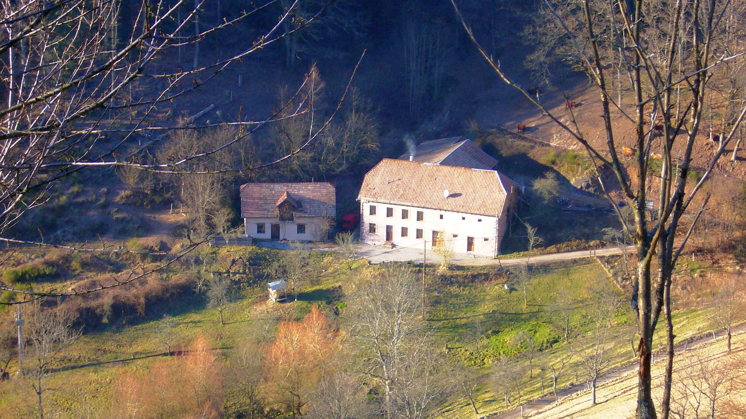 Ferme de Pieureusegoutte. Photo prise depuis la route du Col de Fouchy